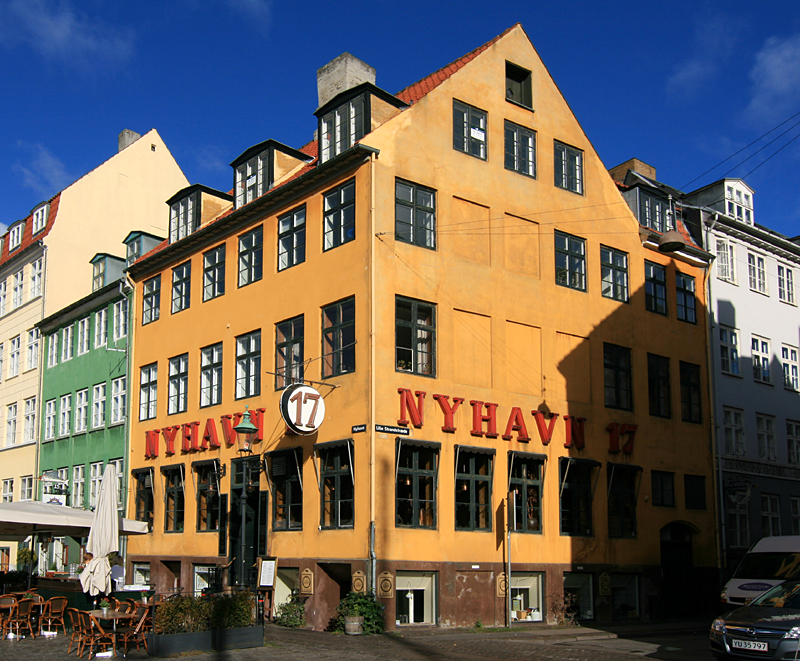 Nyhavn 17, København. Bygget 1670. Fredet.